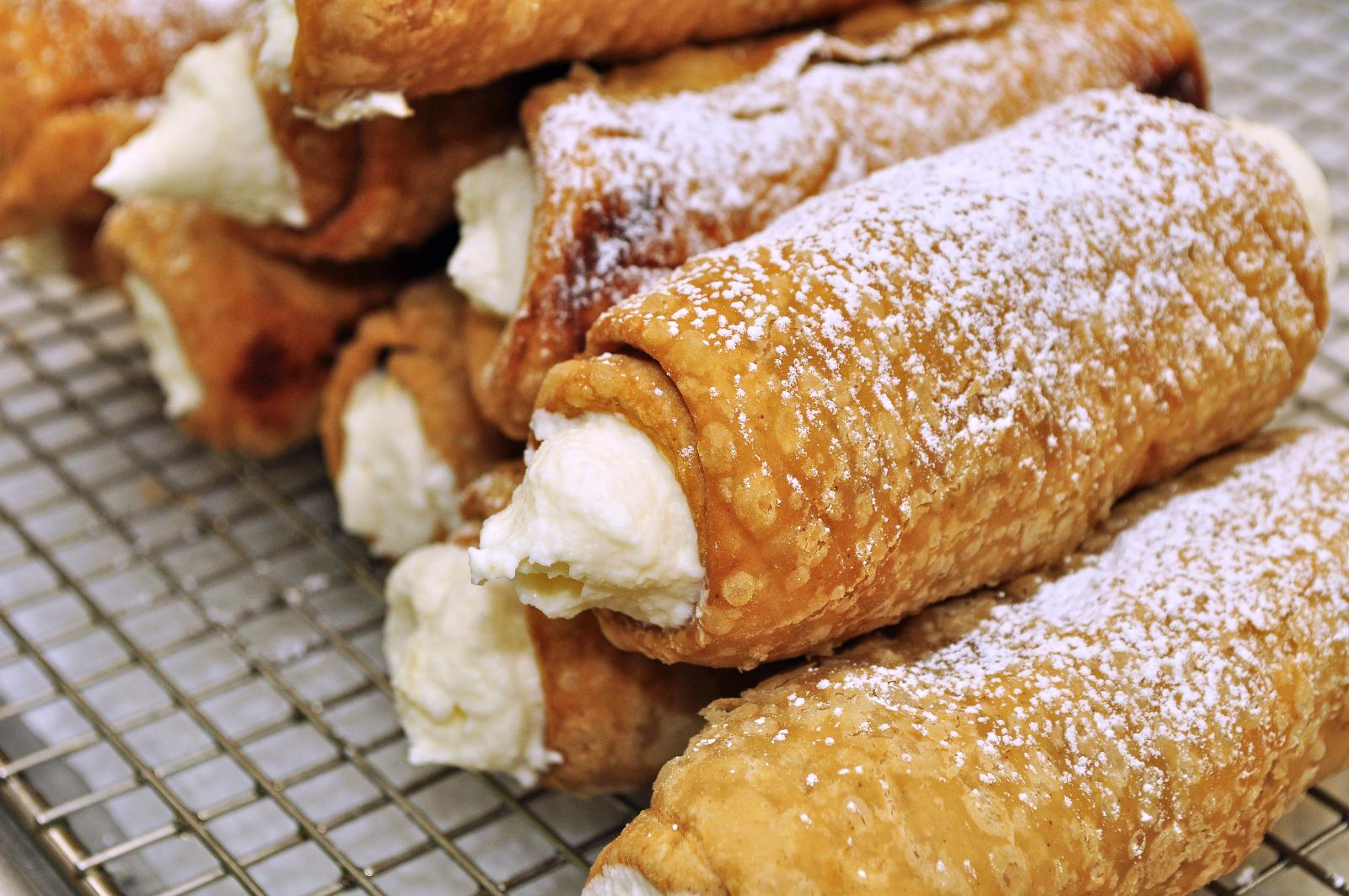 Cannoli